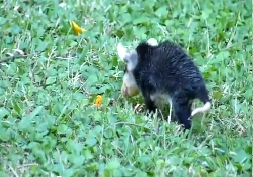 Zarigueya didelphis albiventris bebé